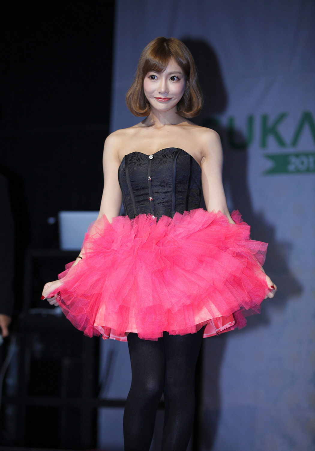 아스카 키라라(Kirara Asuka) 팬미팅